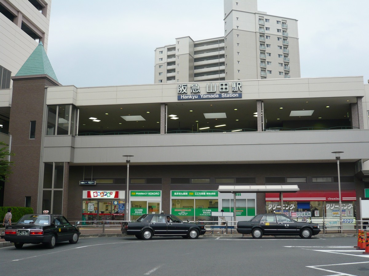 阪急・山田駅東口。